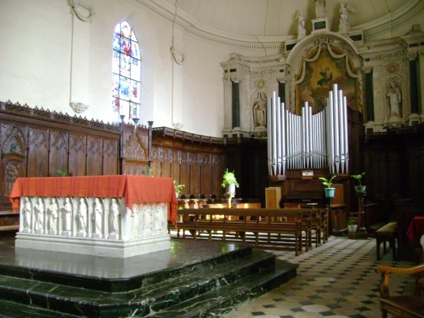 Chœur de l'église de Candé, Maine-et-Loire, France.